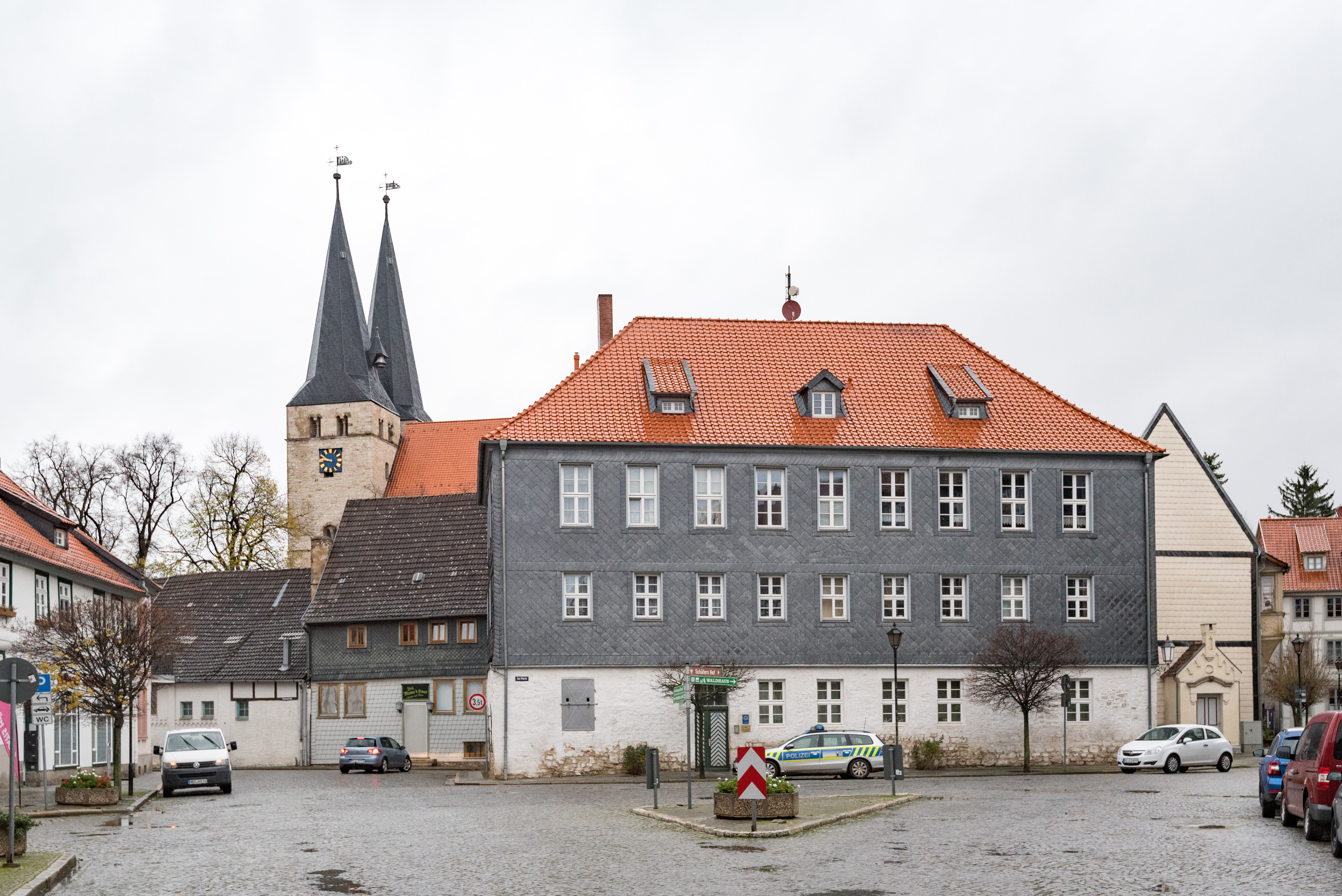 Osterwieck, Am Markt 17